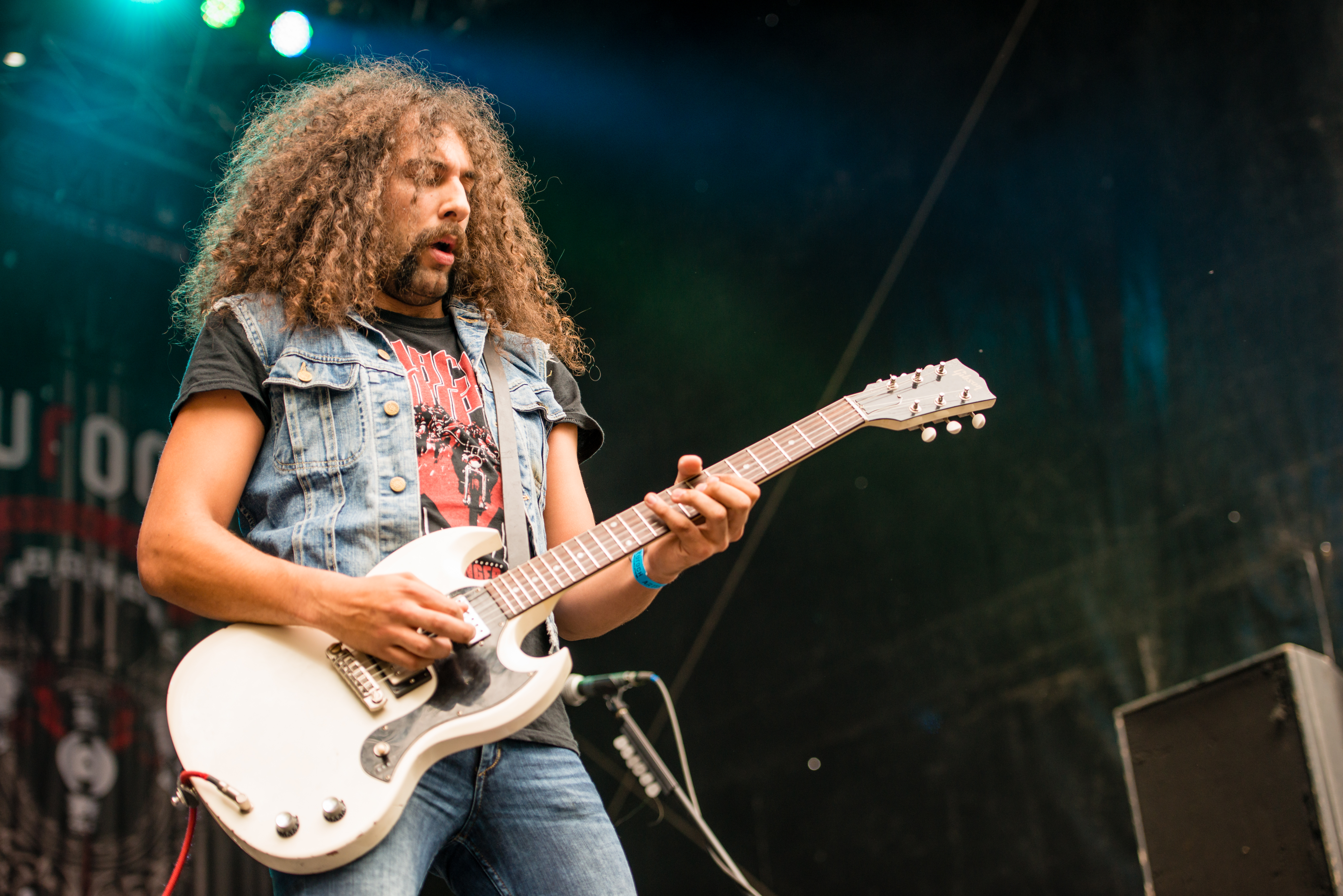 'Turock Open Air 2014 - Essen': 'Dead Lord'